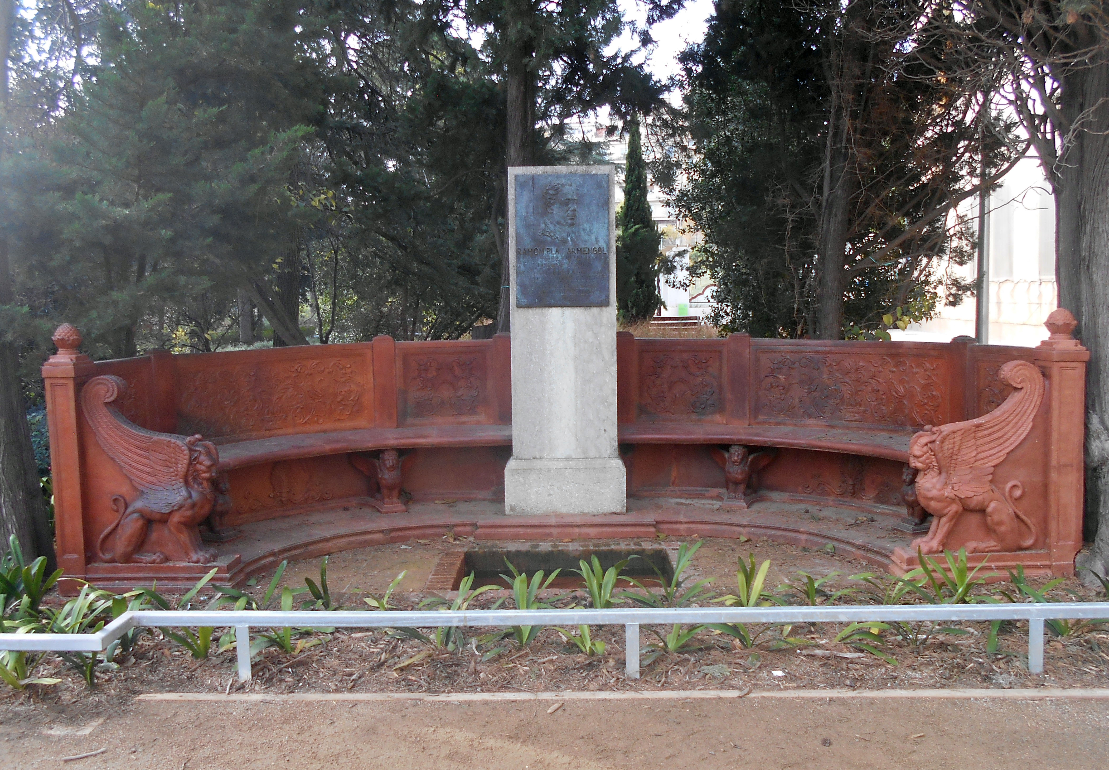 Monumento a Ramon Pla i Armengol